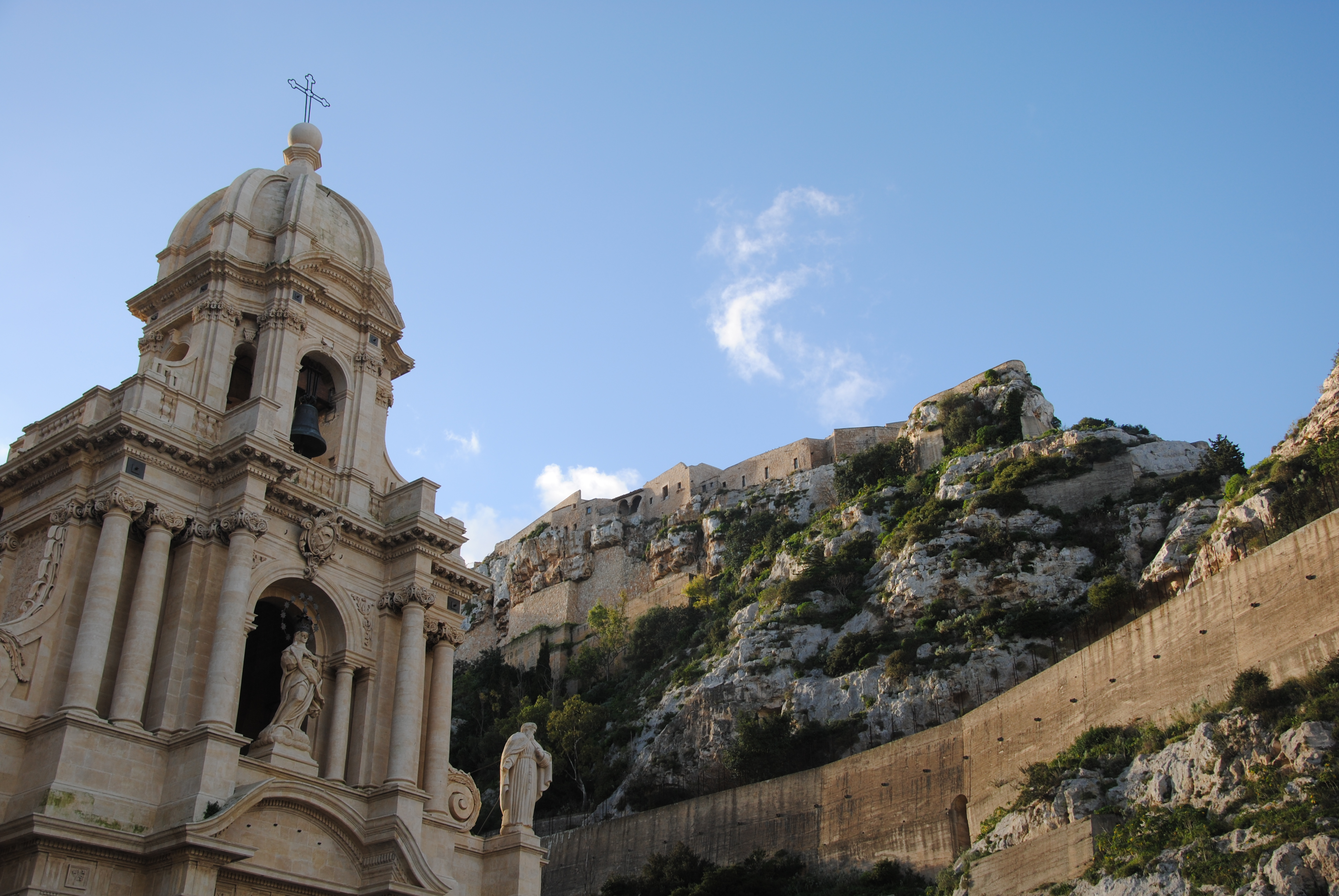 Ritratto della Chiesa di San Bartolomeo nelle ore mattutine, con in sfondo, le necropoli sciclitane di Chiafura, sovrastate dal Convento della Croce This is a photo of a monument which is part of cultural heritage of Italy.